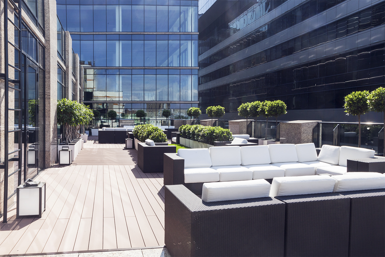 Террасы бизнес-центра "Белые Сады"